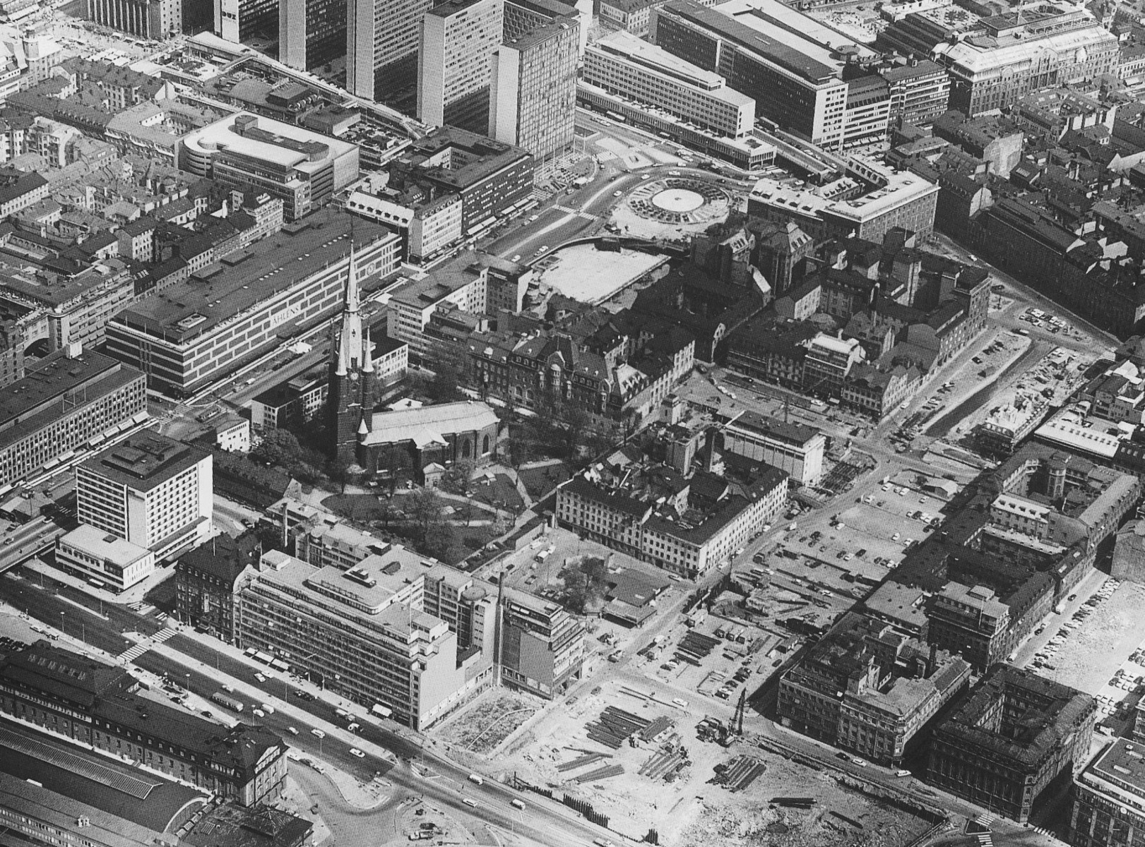 Stockholm, Nedra Norrmalm i samband med rivningar för Klaratunneln maj 1967